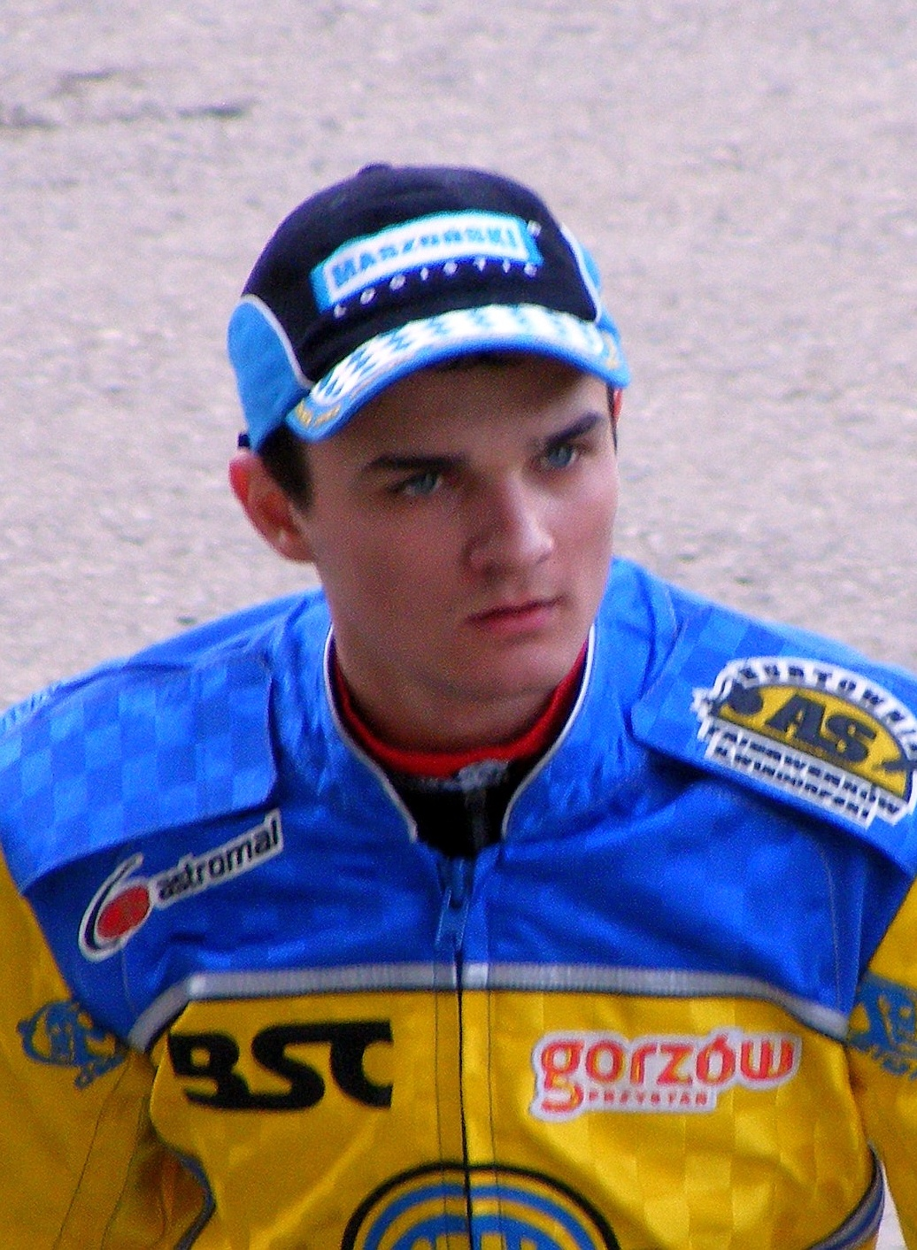 Bartek Zmarzlik, zawodnik Stali Gorzów, 2013